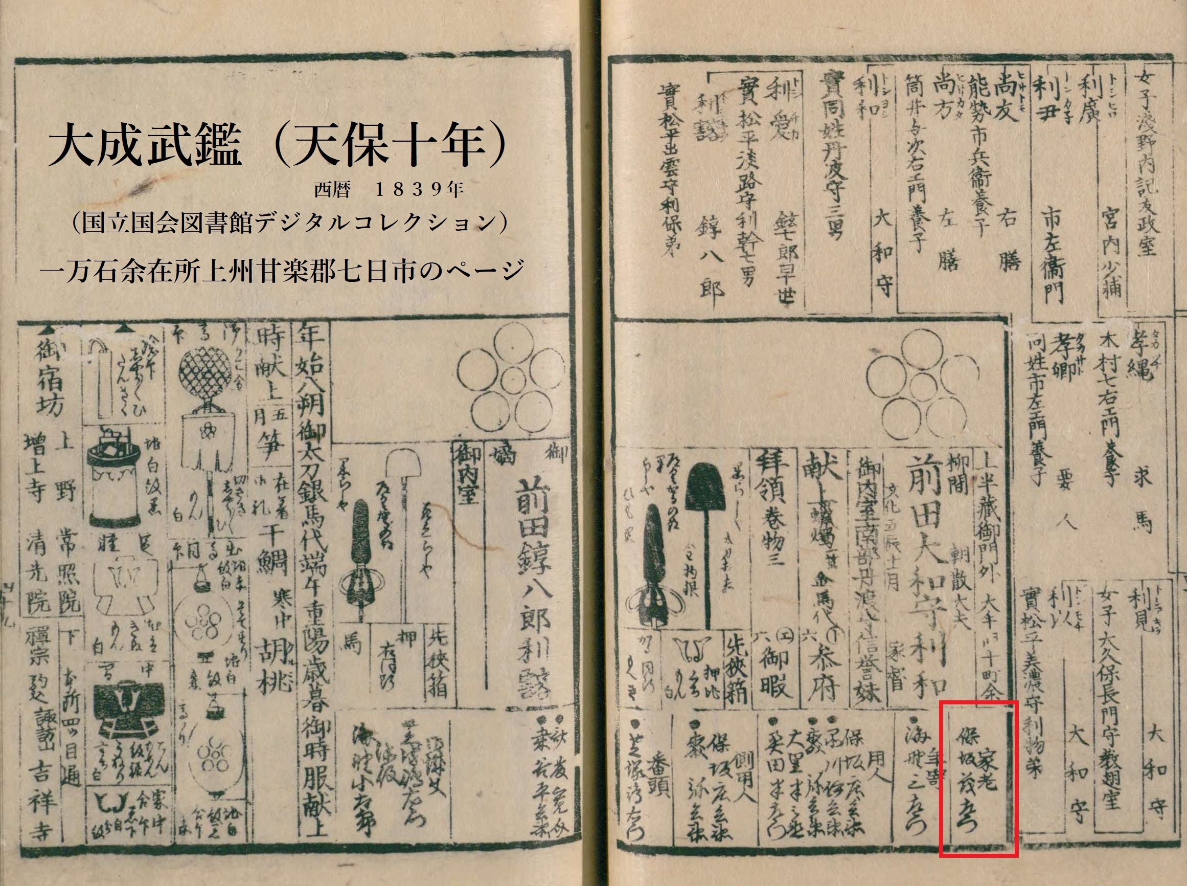 天保10年（1839年）の大成武鑑（国立国会図書館デジタルライブラリーより）